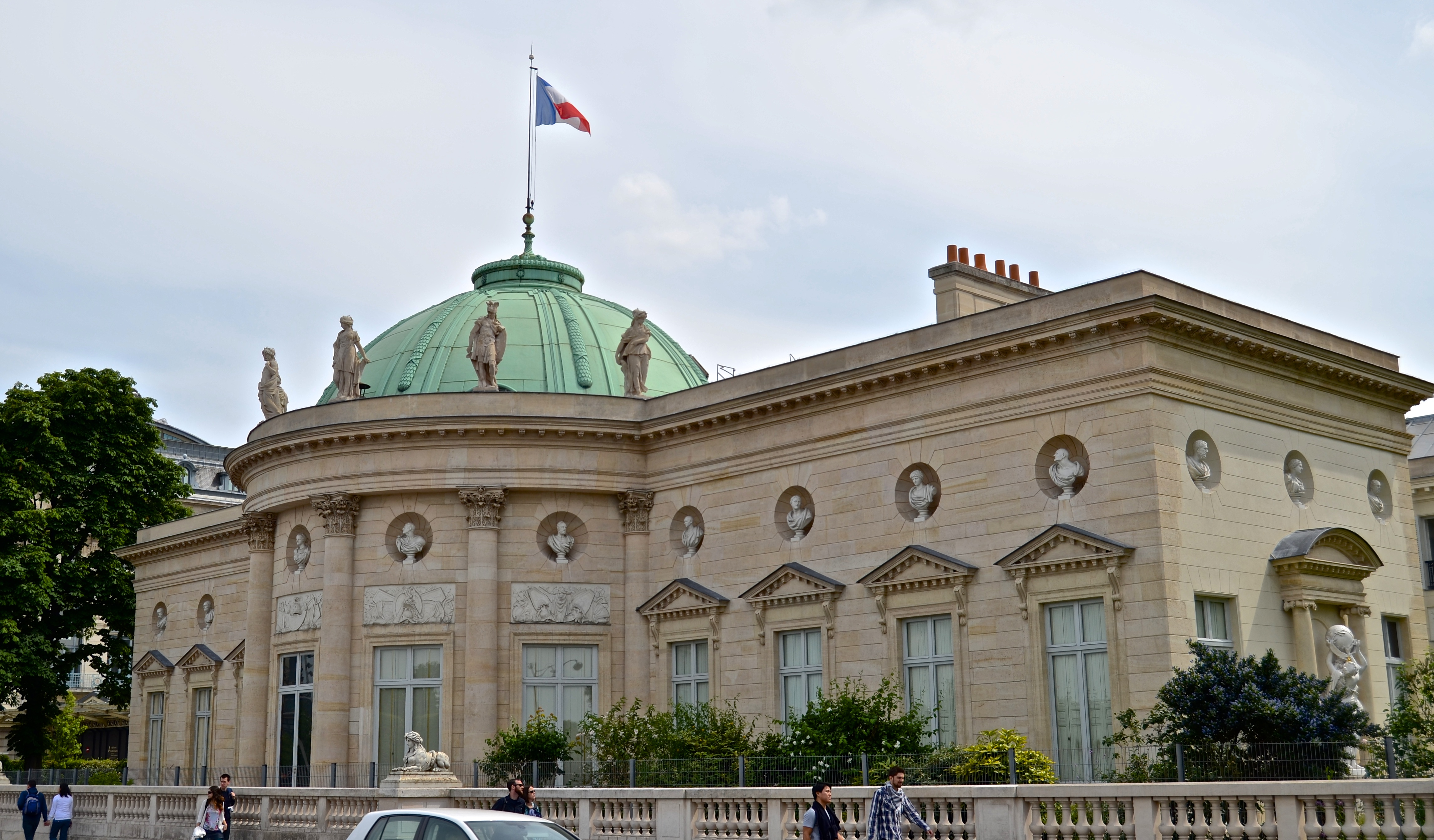 Hôtel de Salm, Paris.